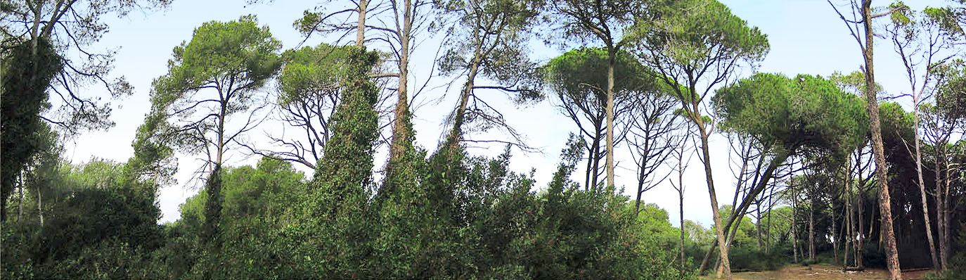 la Devesa del Saler, a l'Albufera de València (Ciutat de València), País Valencià.